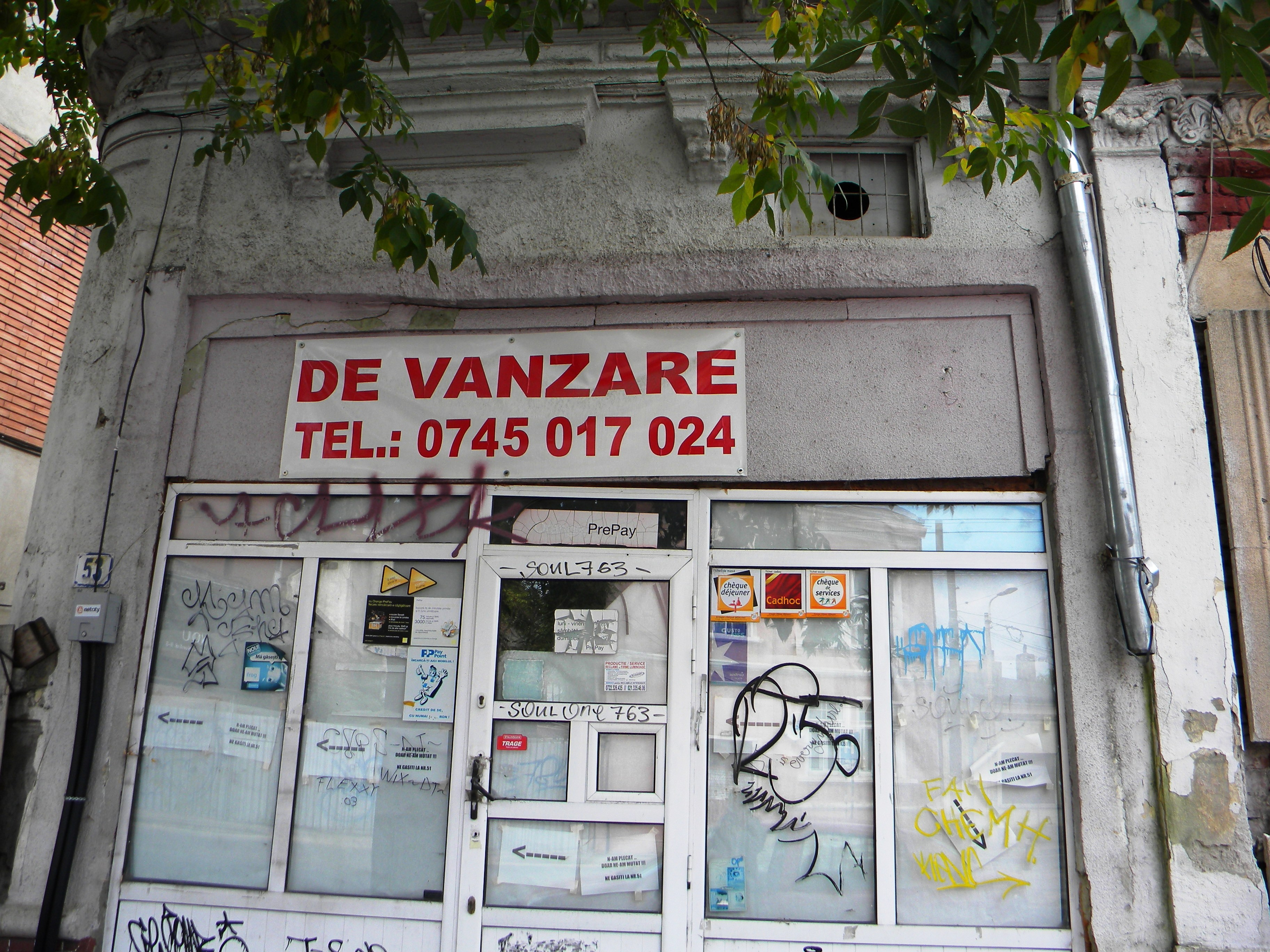 Bucuresti, Romania, Casa pe Calea Grivitei nr. 53, sect. 1